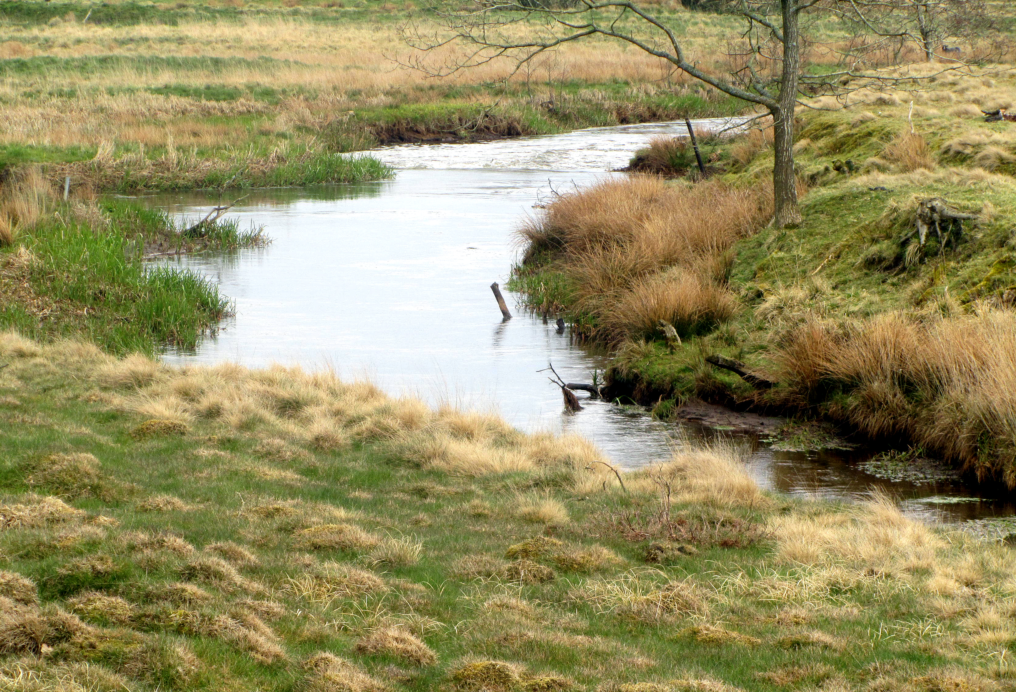 Skjern Å før sammenløbet med Rinds Å